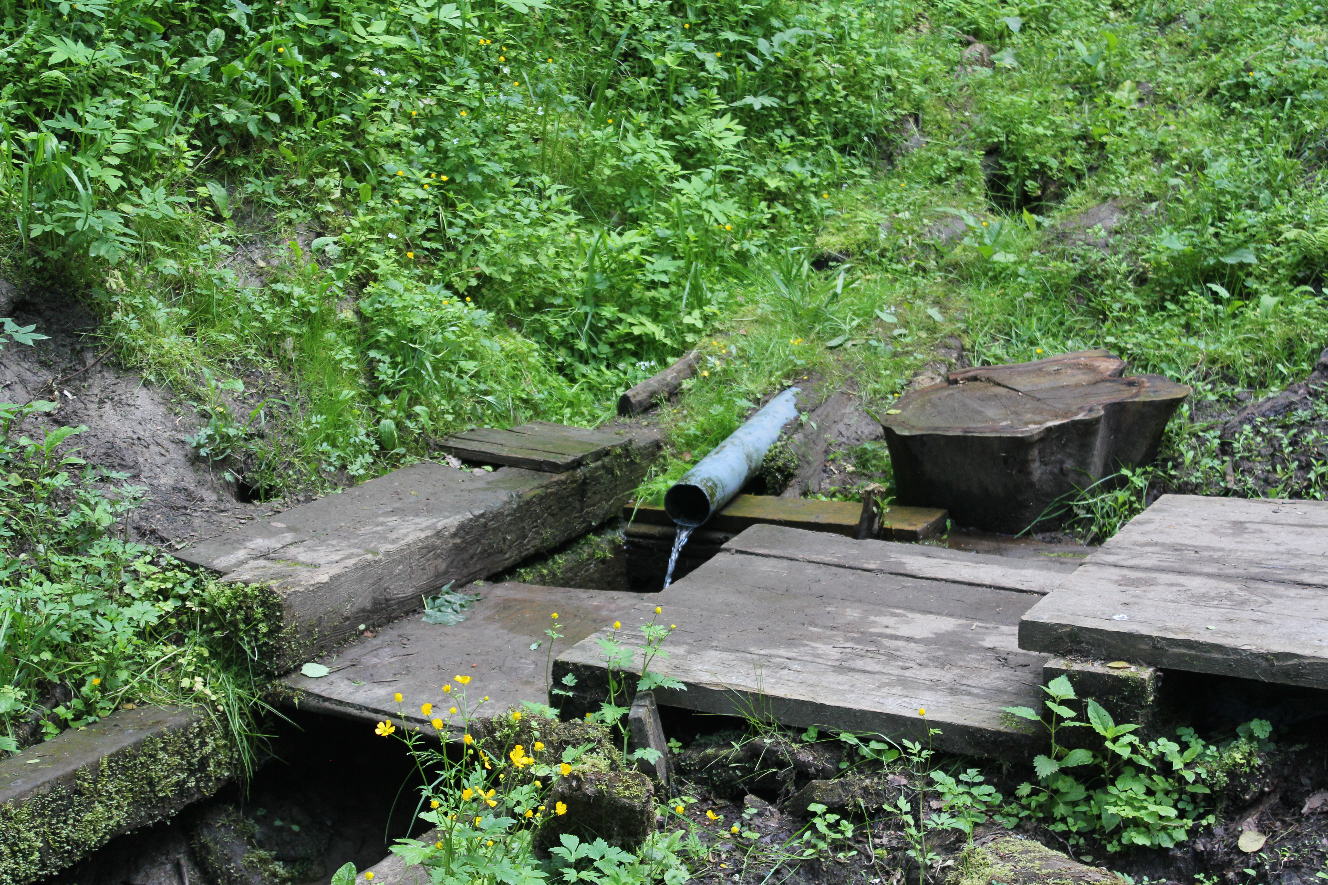 Шаляпинский родник в Валуевском лесопарке